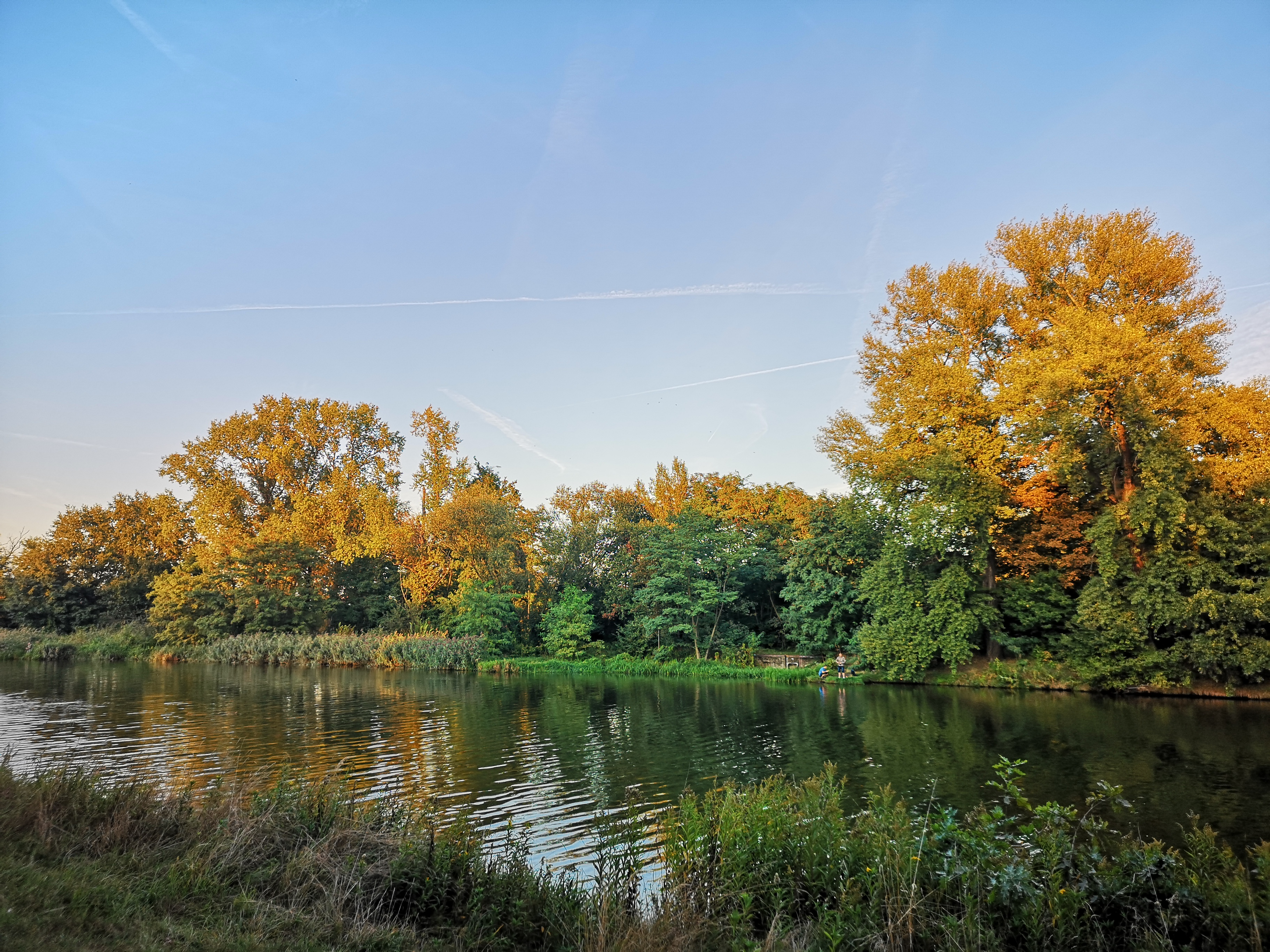 Stara Odra na północ od mostu Szczytnickiego.